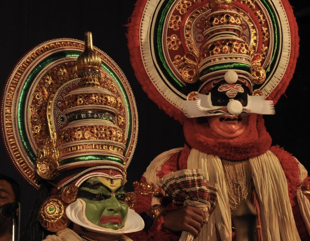 Kalamandalam Gopi as Karnan & Kalamandalam Hari R Nair as Dushasanan